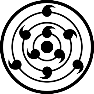 Mata unik milik Makhluk Berekor Sepuluh